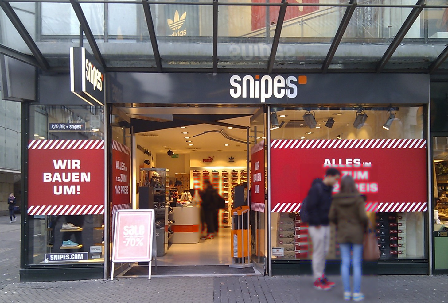 Geschäfte Mannheim O4